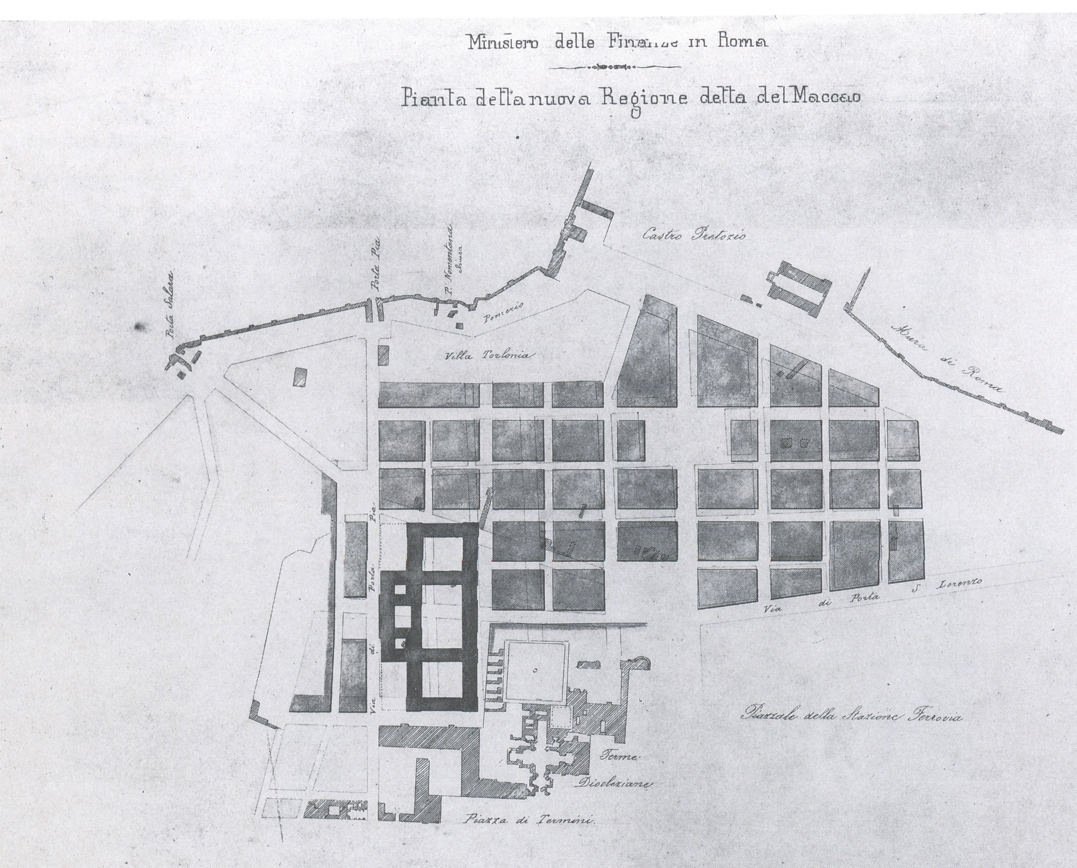 Piano di edificazione della zona Macào, a Roma